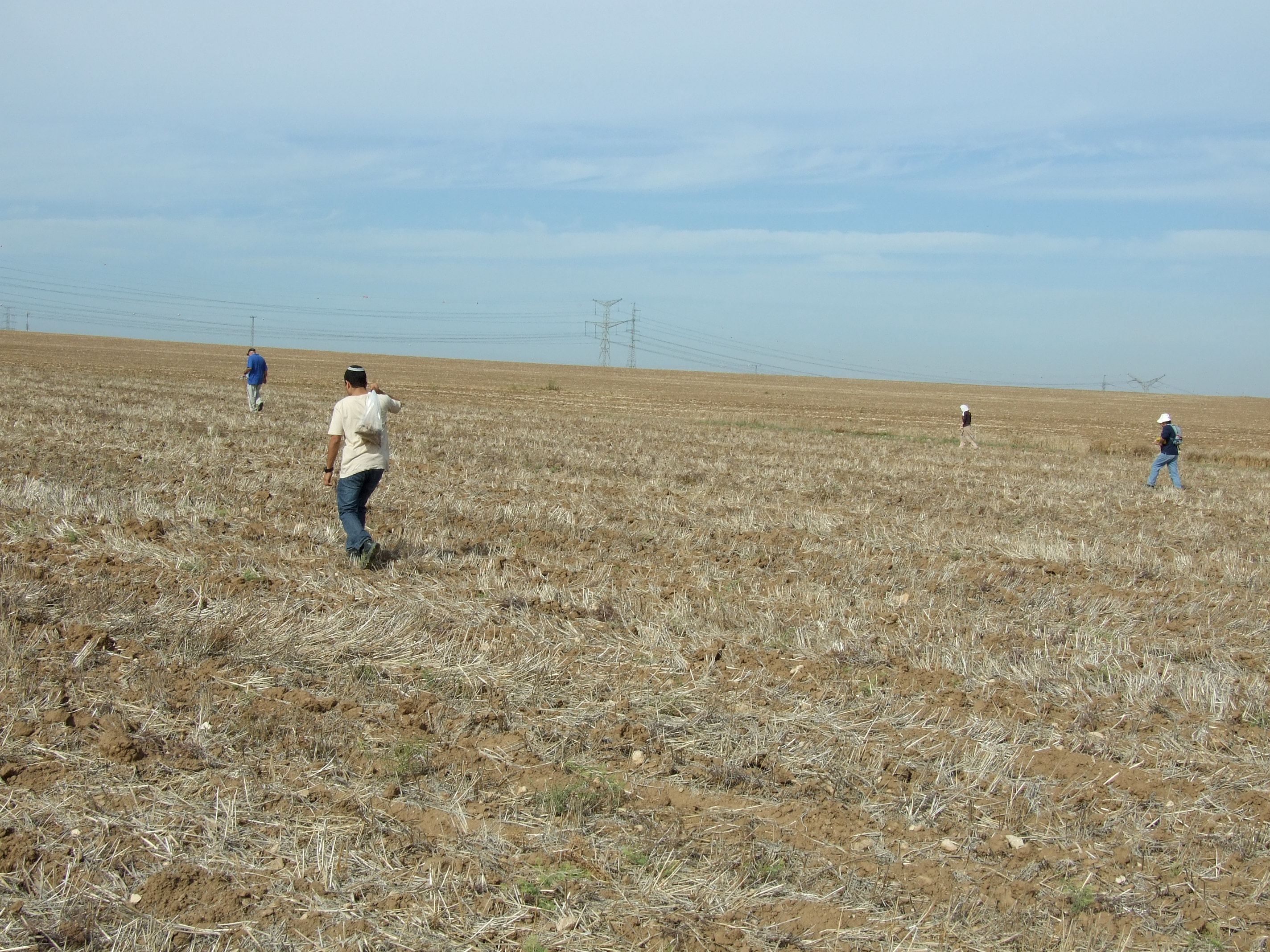 סקר ישראל בשדות במפת באר טוביה